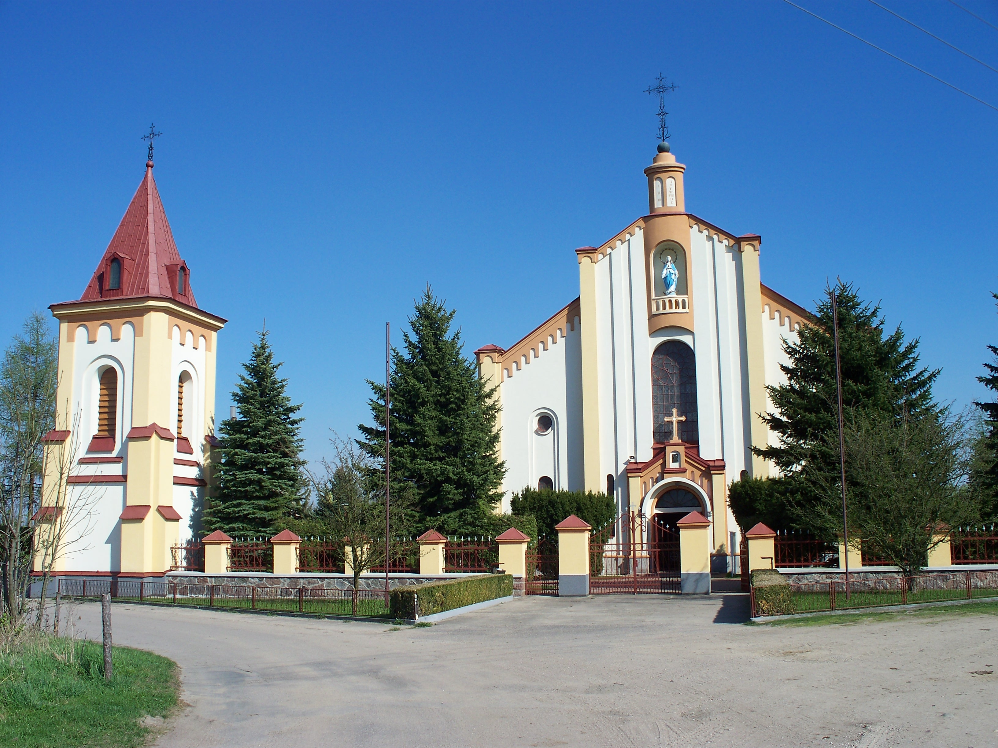 Kościół wzniesiony w latach 1870-1877. W 1944 r. ustępujące wojska niemieckie zburzyły kościół, pozostało 10 % uszkodzonych murów wymagających rozbiórki, dzwonnica też została zniszczona. Świątynia została odbudowana na dawnych fundamentach – poświęcona 24 września 1950 r. (z W. Jemielity, Jubileusz 500-lecia Parafii Waniewo, Waniewo 2011 r. s. 16-17).